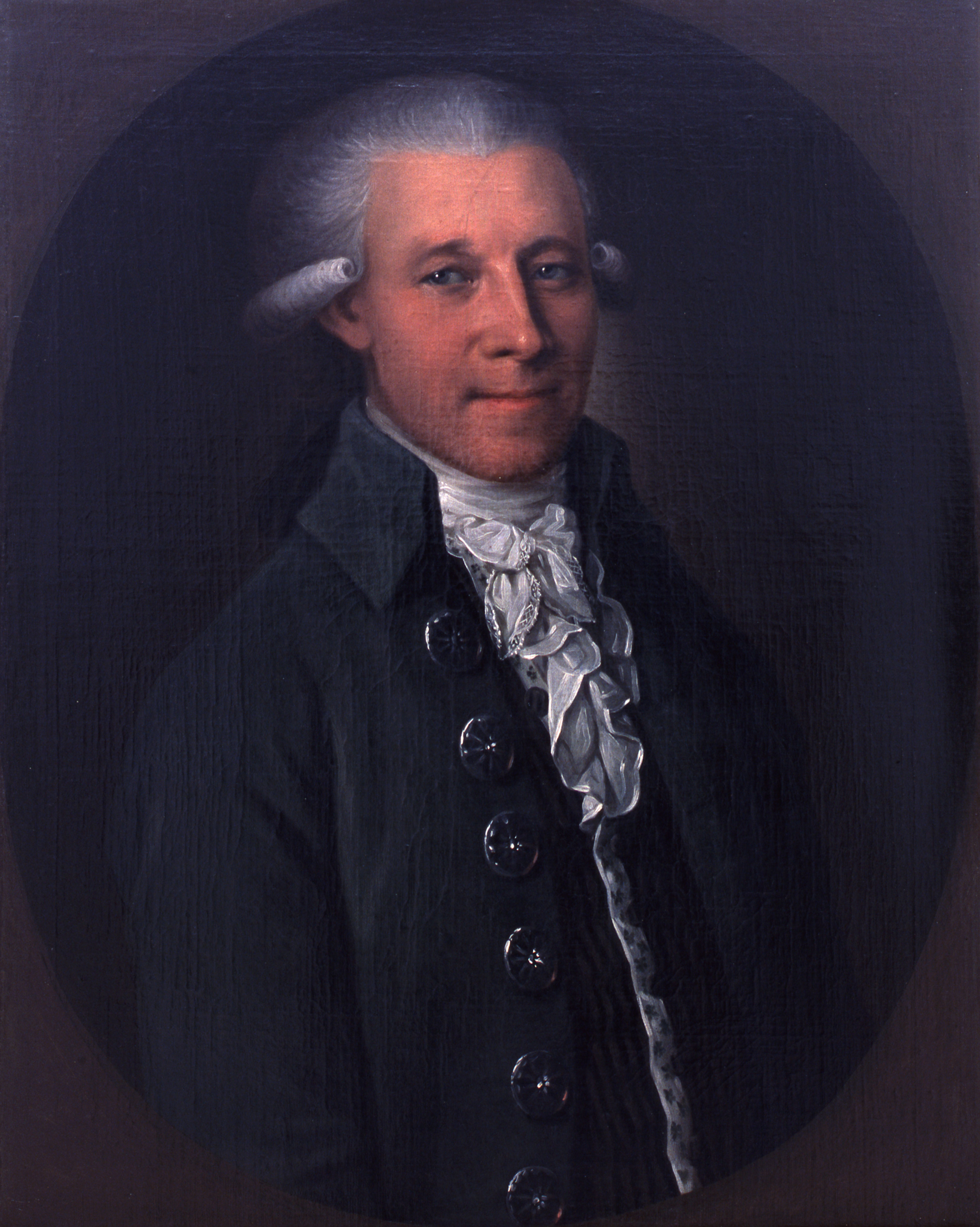 Bildnis des Bürgermeisters Siegfried Joachim Meyer, Amtszeit 1798-1836, Öl/Leinwand, 70,6 x 56,2 cm